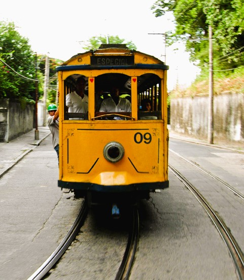 A vintage tram (bonde in Brazilian Portuguese) on Rio de Janeiro's, Santa Teresa Tram line.